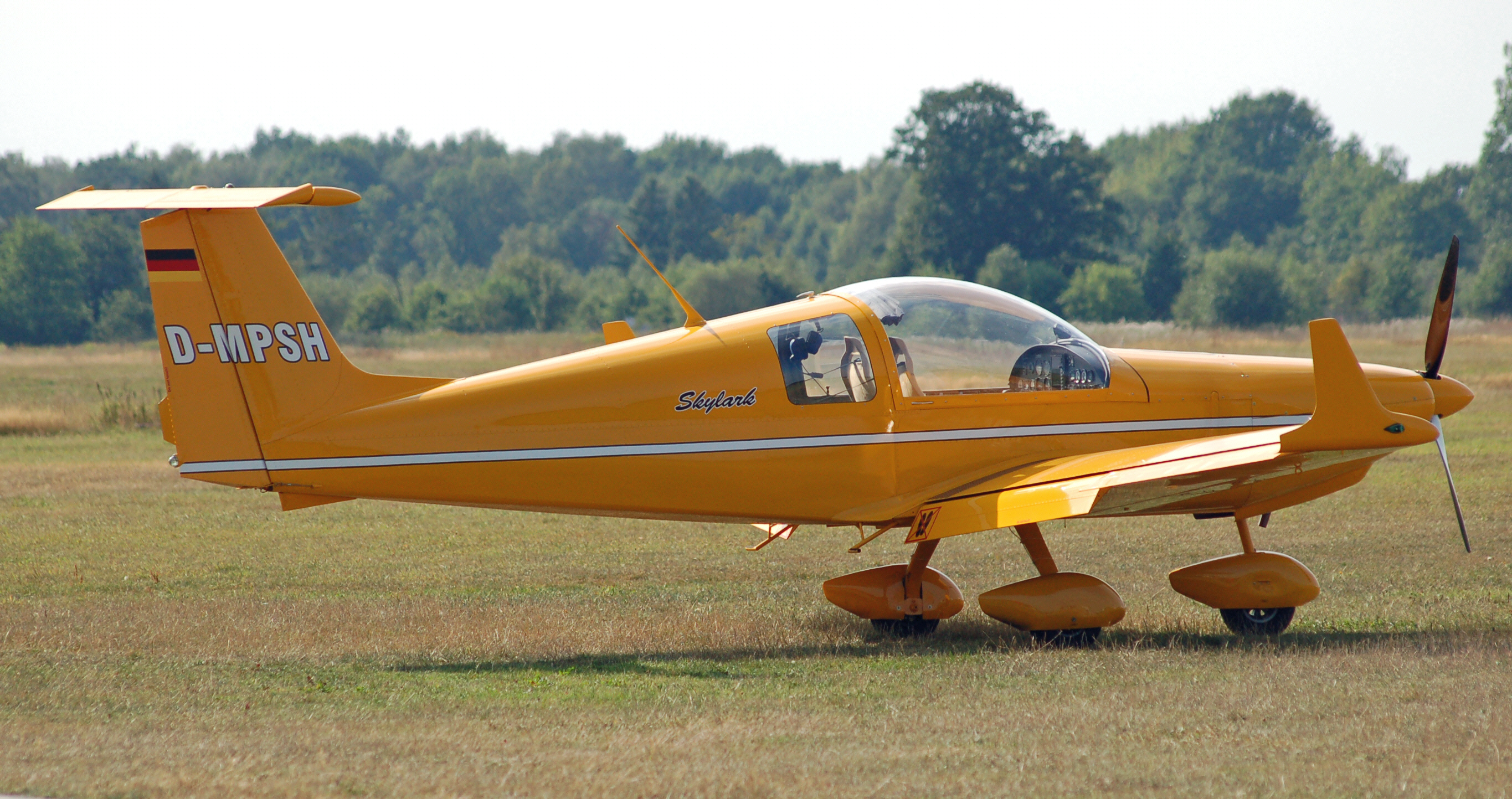 Dova DV-1 Skylark auf dem Flugplatz Uetersen